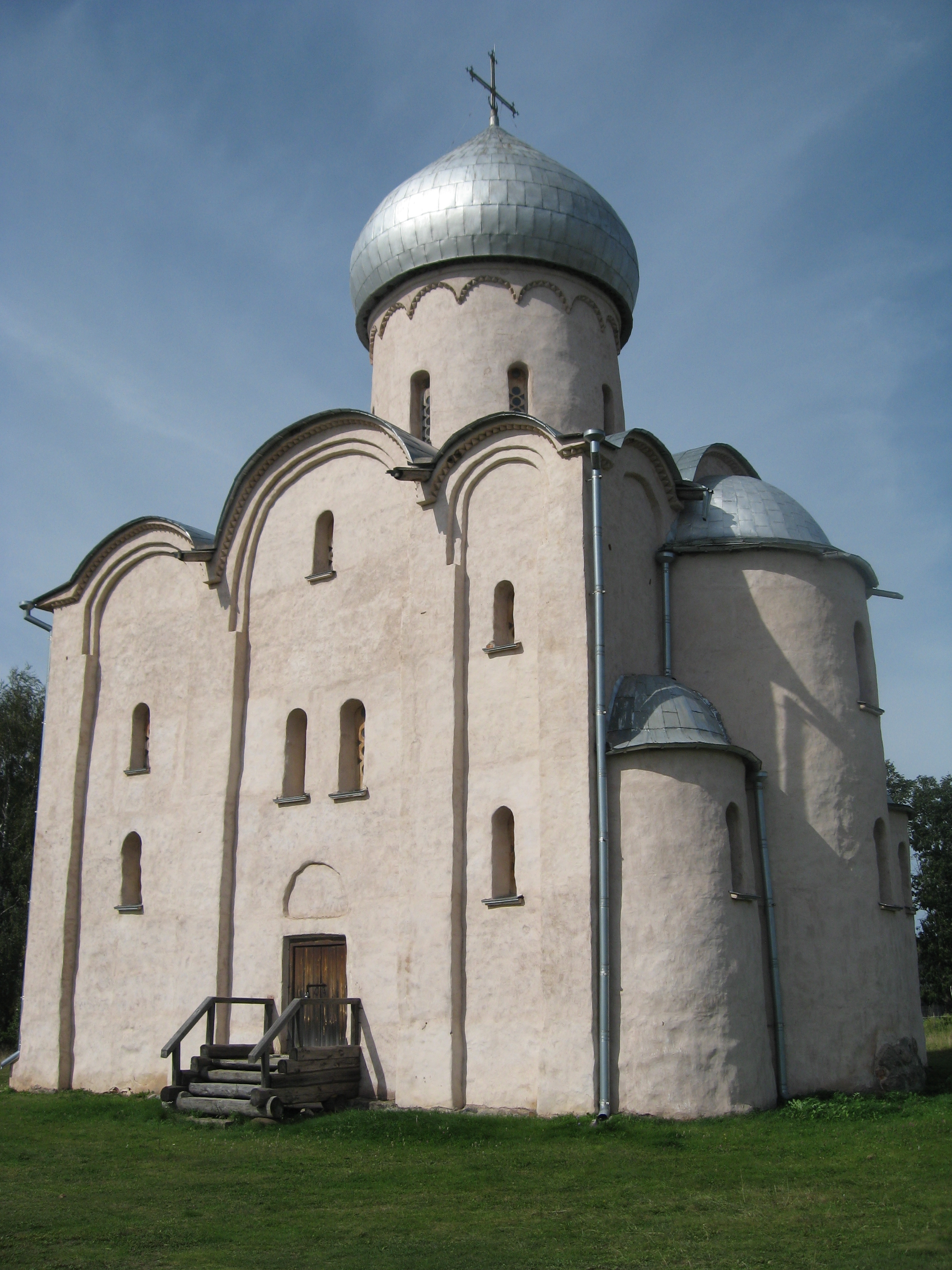 Церковь Спаса Преображения на Нередице под Великим Новгородом